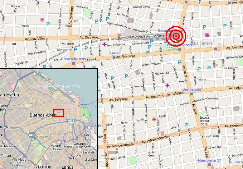 Ubicación de la estación de Once